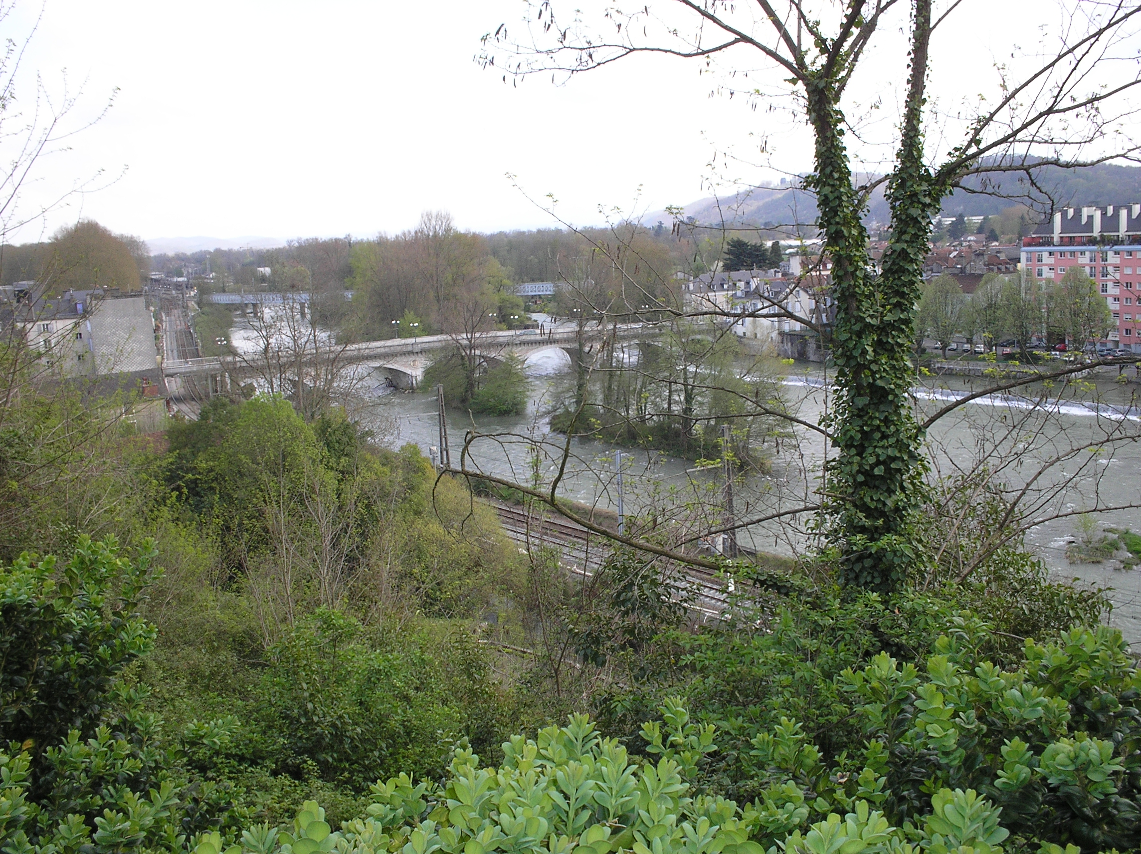 Gave de Pau à Pau